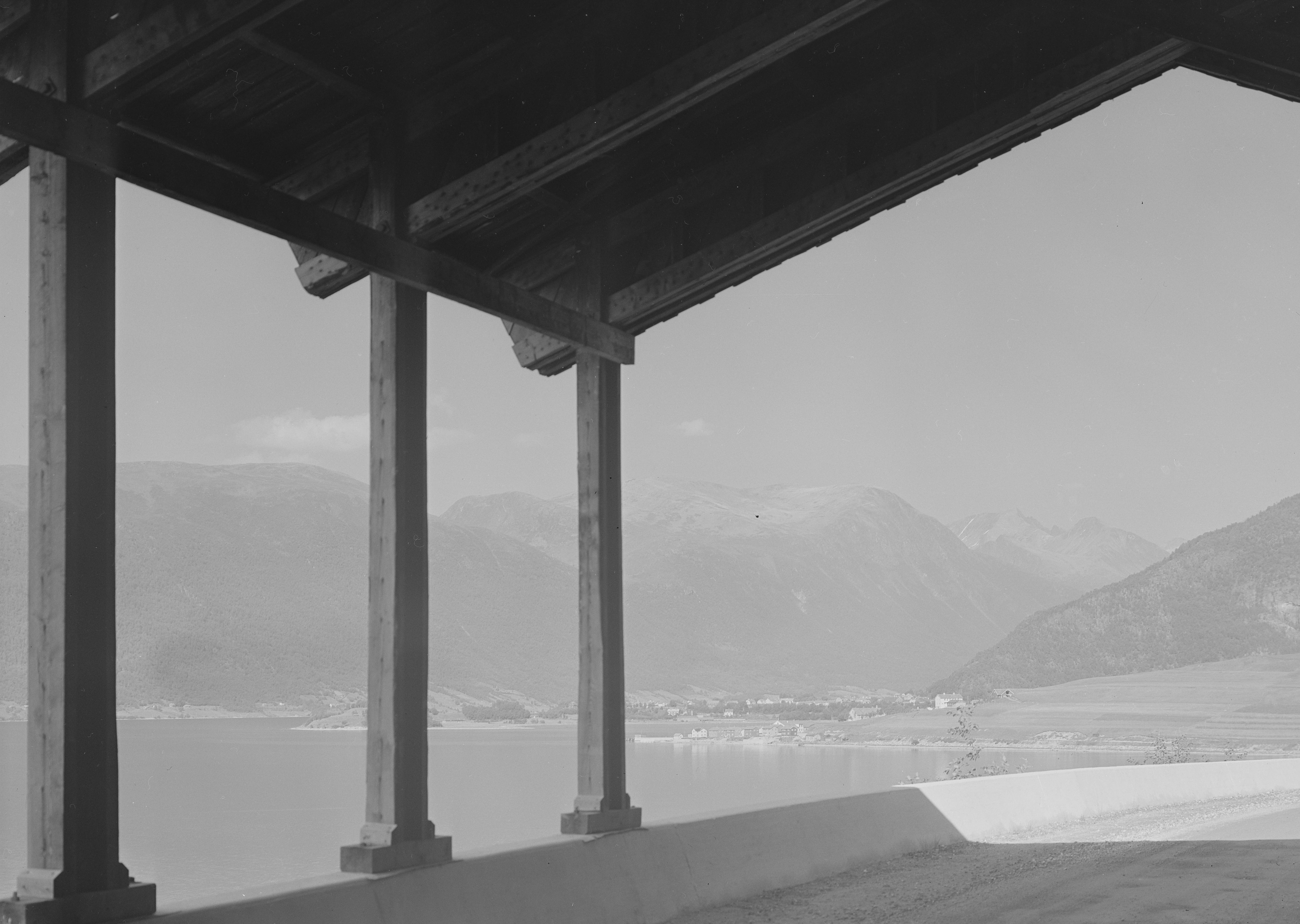 Bildet er hentet fra Nasjonalbibliotekets bildesamling. Anmerkninger til bildet var: Fotograf : ukjent Romsdalsfjorden,Åndalsnes, Rauma, Møre og Romsdal